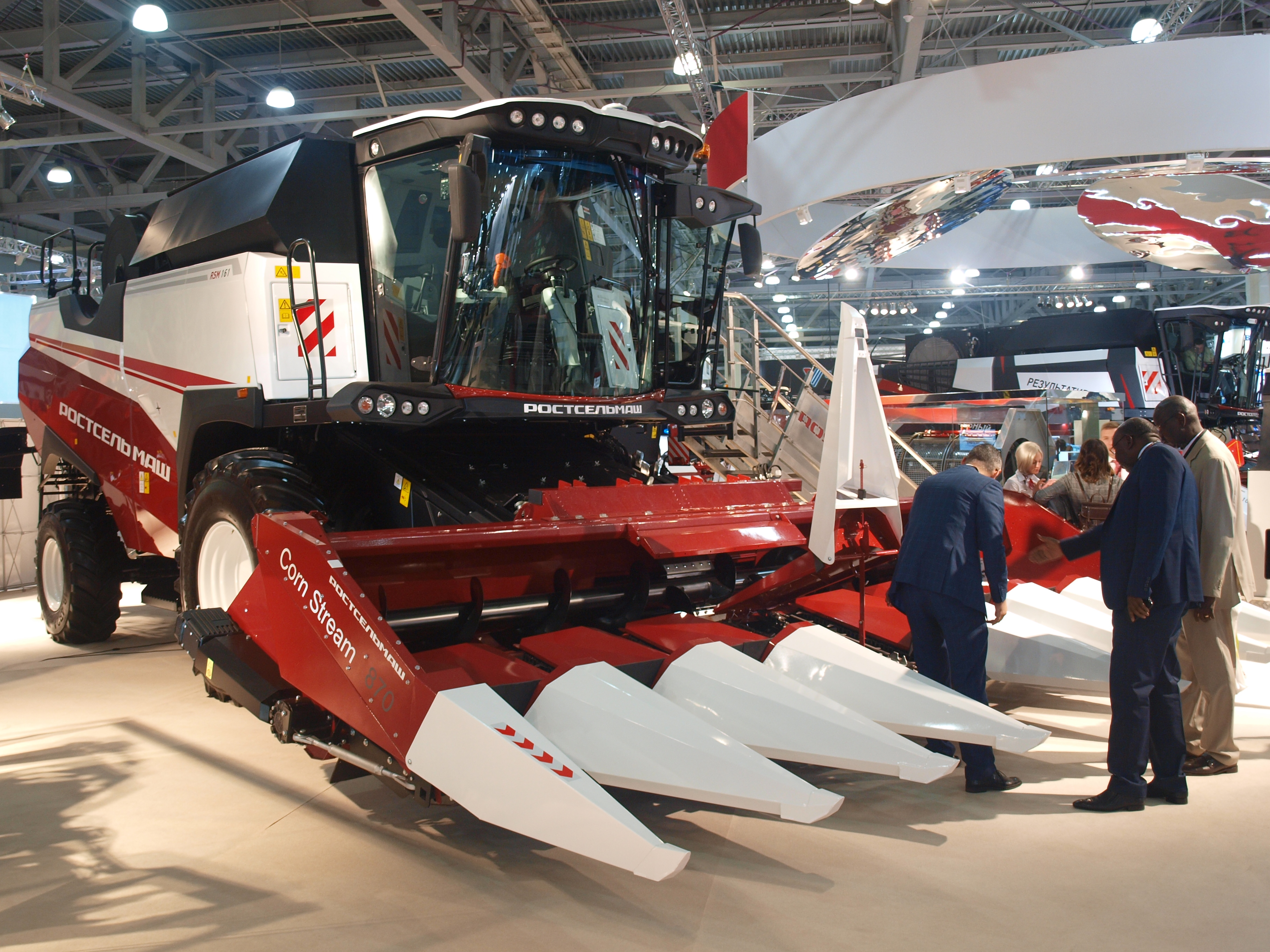 Крокус Экспо.10.10.2018